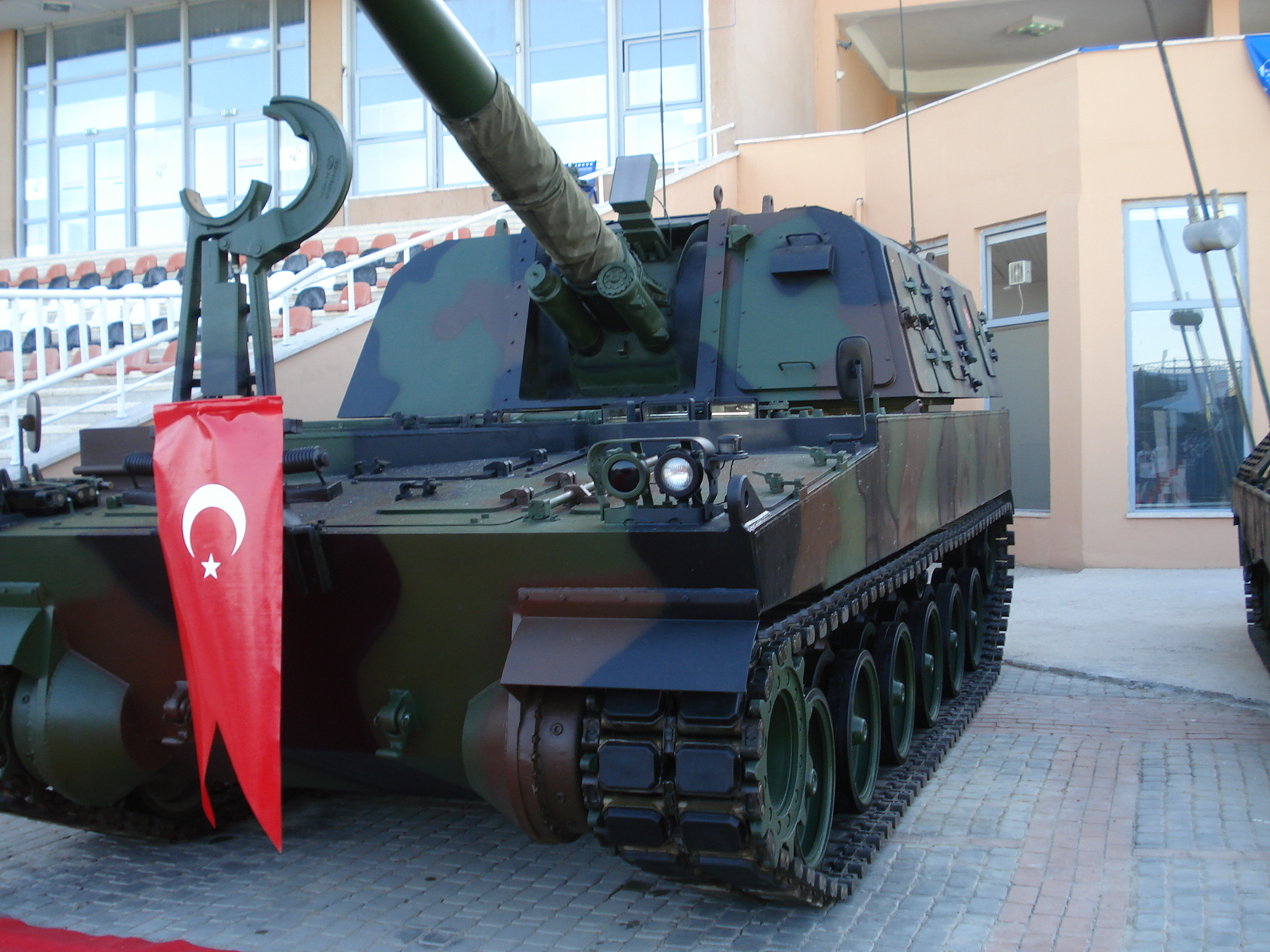 IDEF '07 Savunma Fuarı'nda çekildi.Fırtına Obüs.23 Mayıs 2007